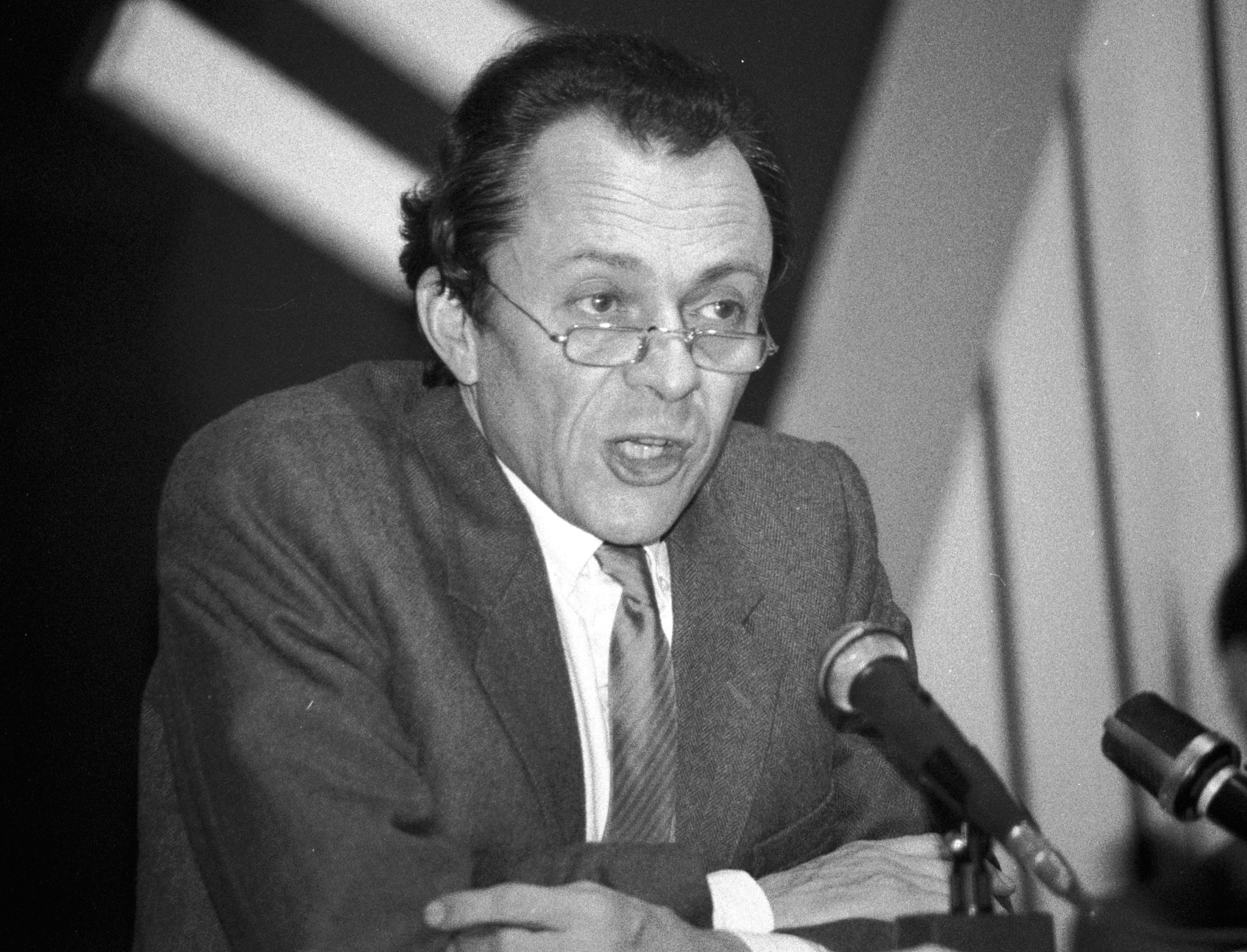 Michel Rocard à Morlaix (Bretagne, France) en octobre 1981.